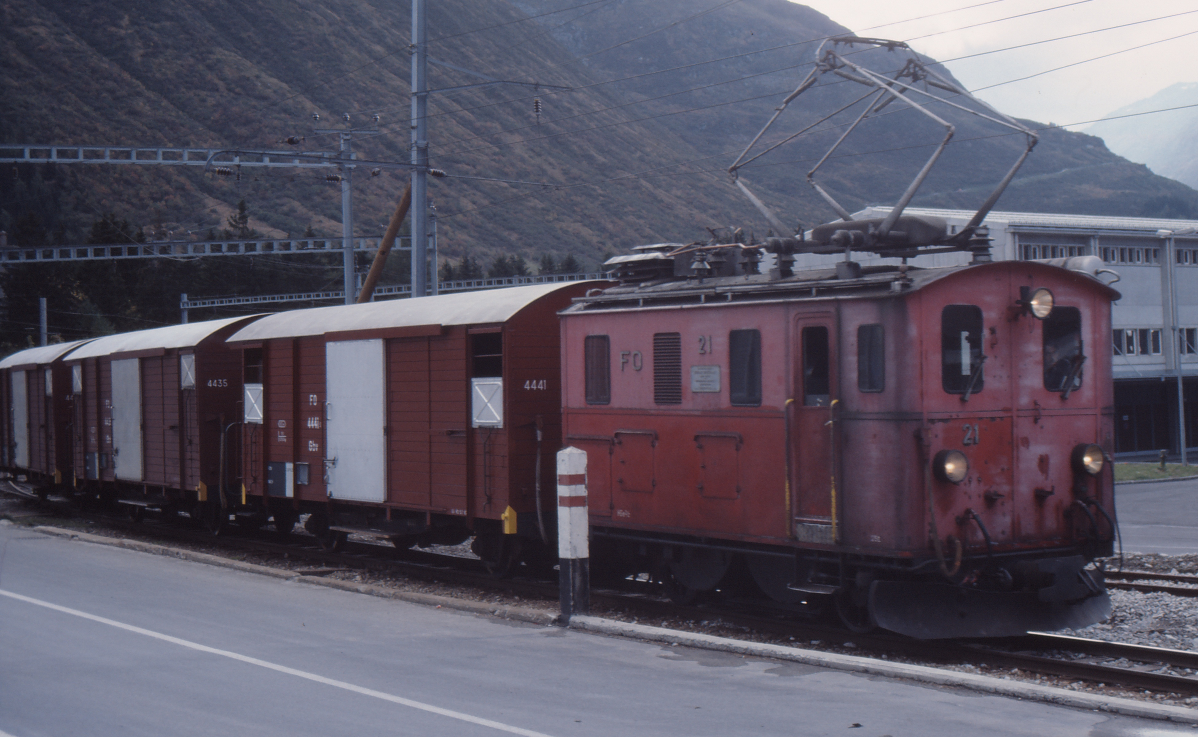 HGe 2/4 der FO in Andermatt